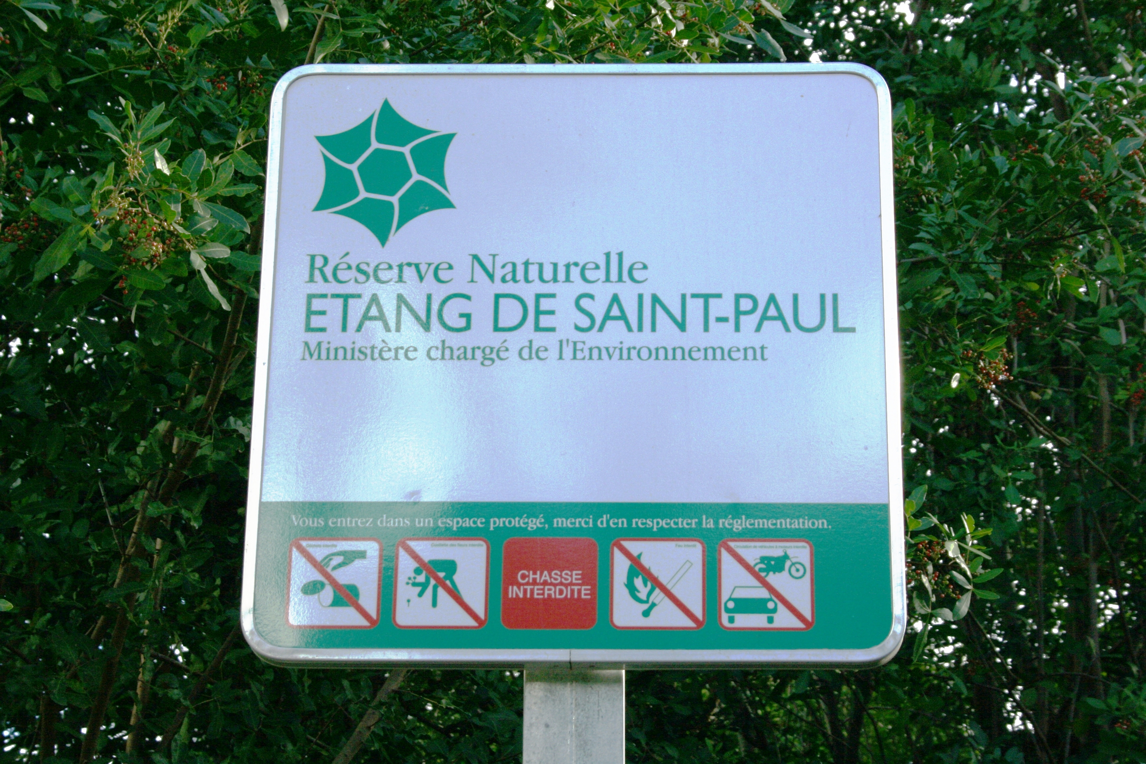 Vue d'un panneau indiquant la réserve naturelle de l'étang de Saint-Paul, à Saint-Paul de La Réunion.